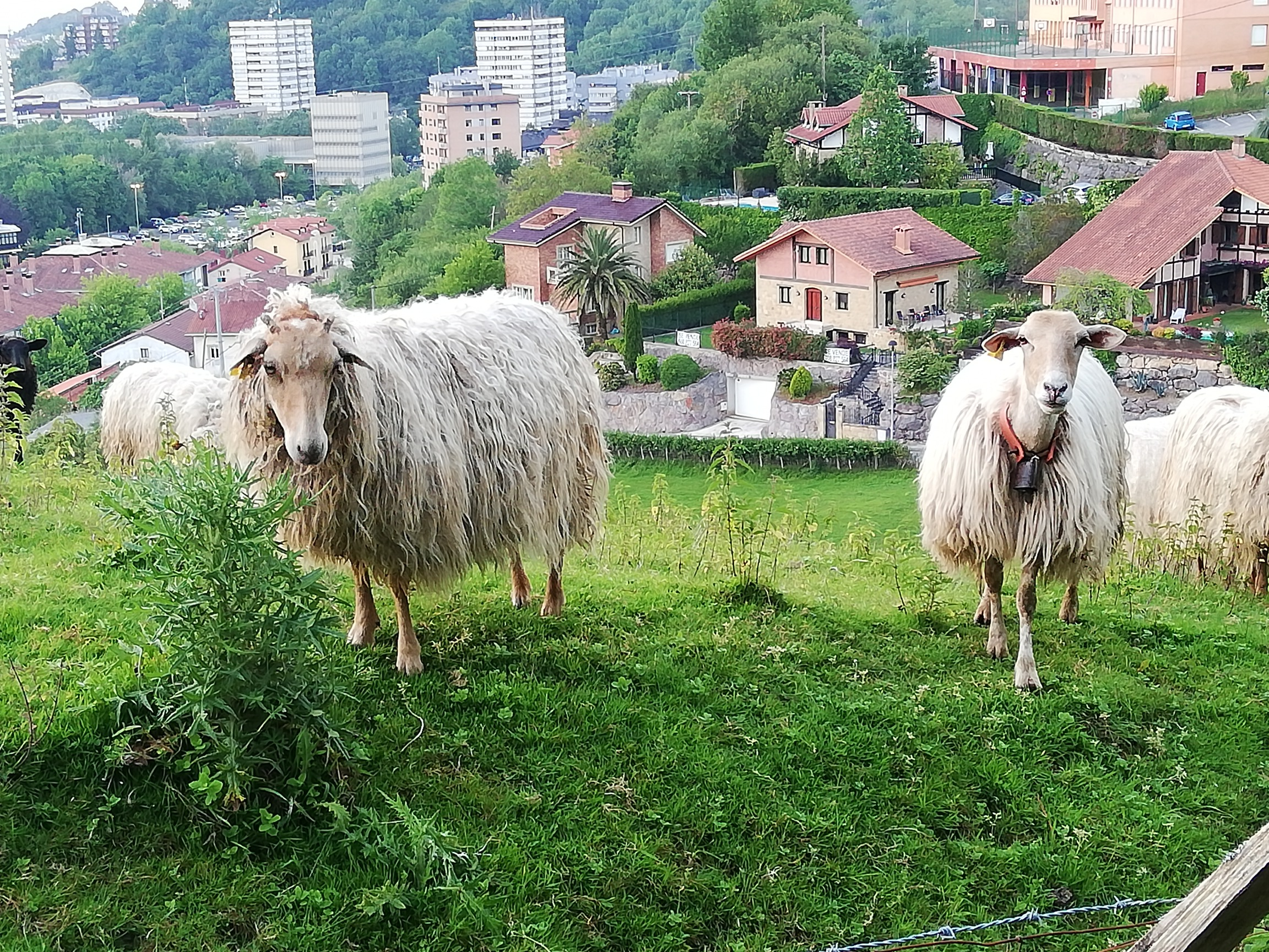 Ibaetan oraindik nekazari inguruko aztarnak ikus daitezke.